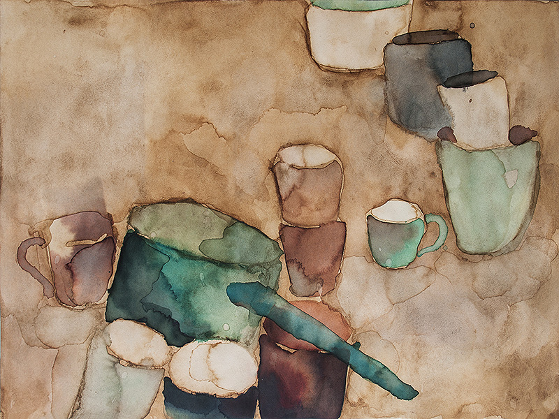 Без назива, Акварел, 2014. 30 х 20 цм, уметничко дело аутора Данице Веселиновић Лиценцирање Template:Za ostavu